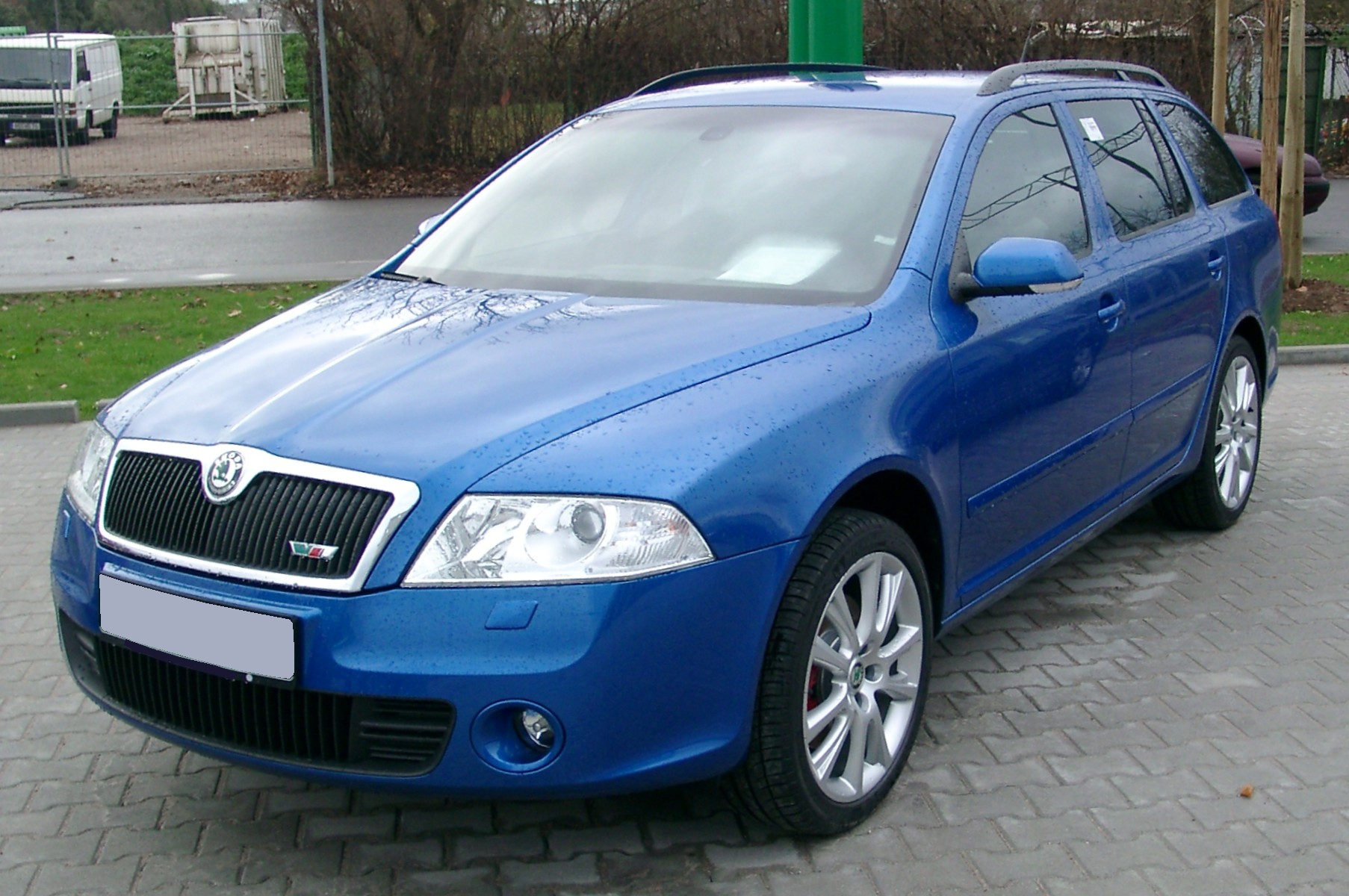 Škoda Octavia Combi, 2. Generation